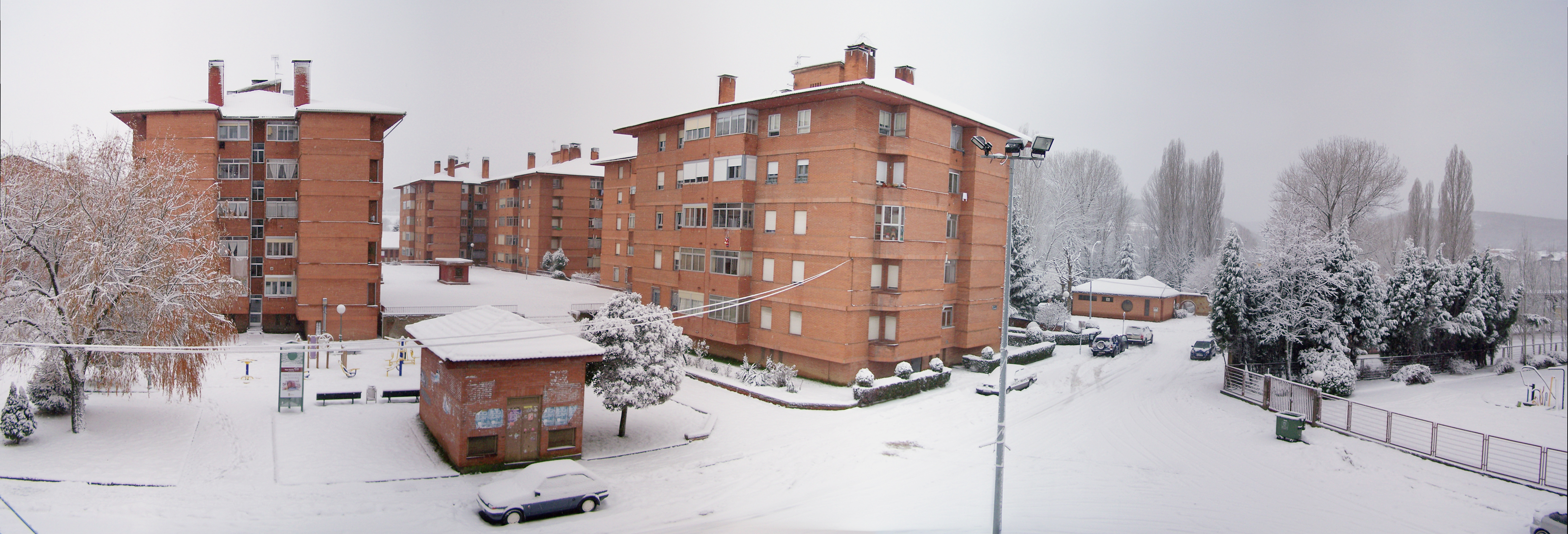 Vista de Guardo nevado (Palencia, Castilla y León, España).